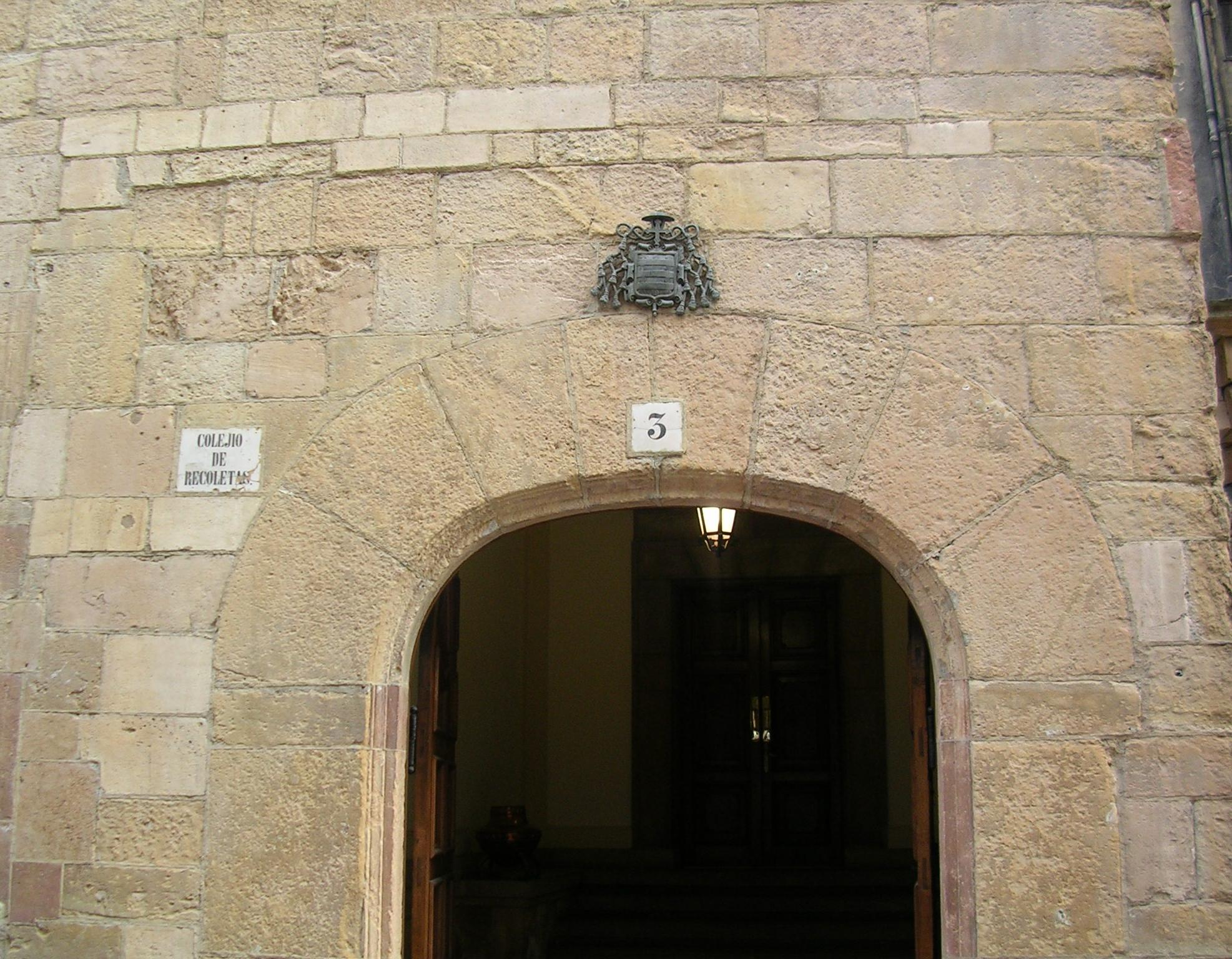 Entrada del antiguo Colejio de Recoletas, en Oviedo, Asturias.